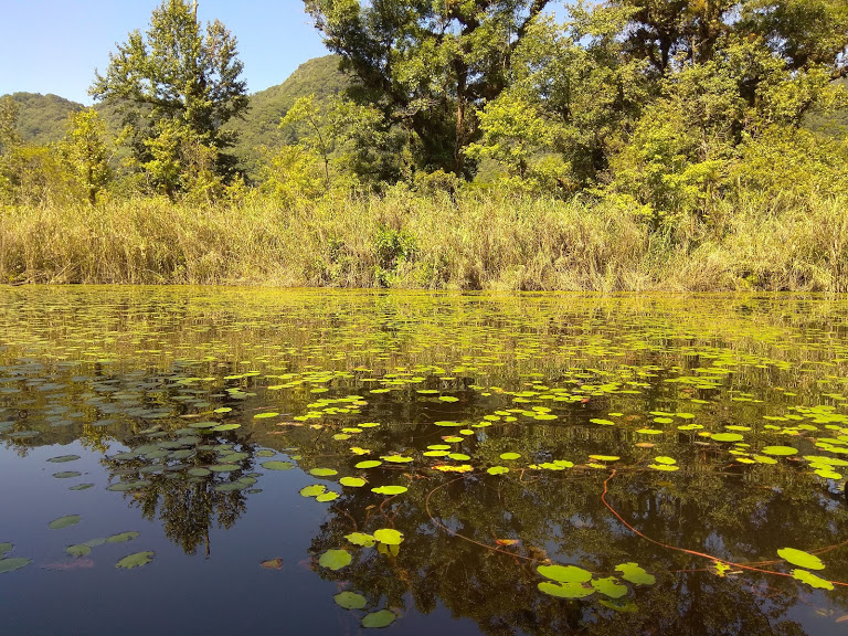 Laguna de santo domingo, un regulador termico de la zona